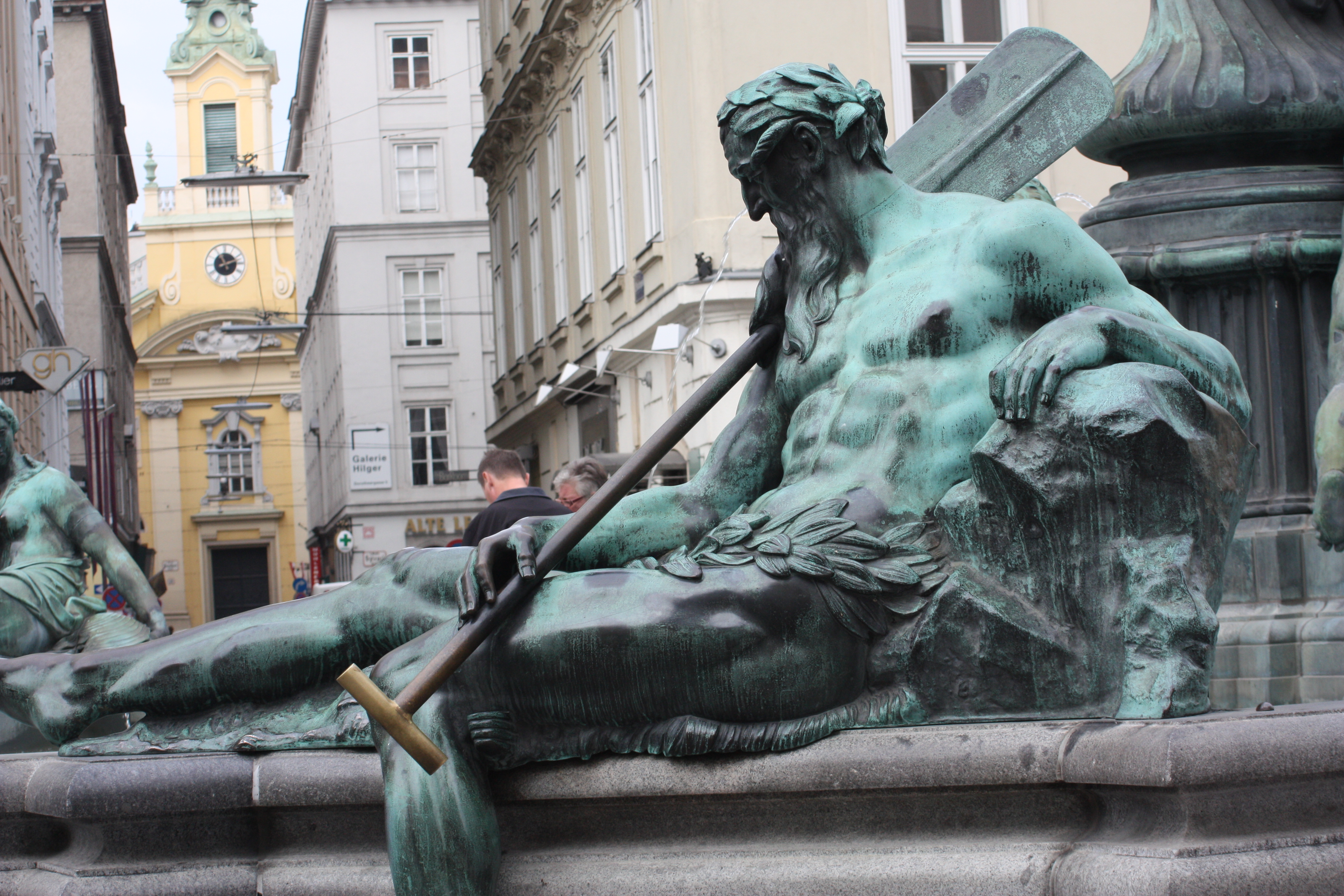 Donnerbrunnen, Wien, Vienna